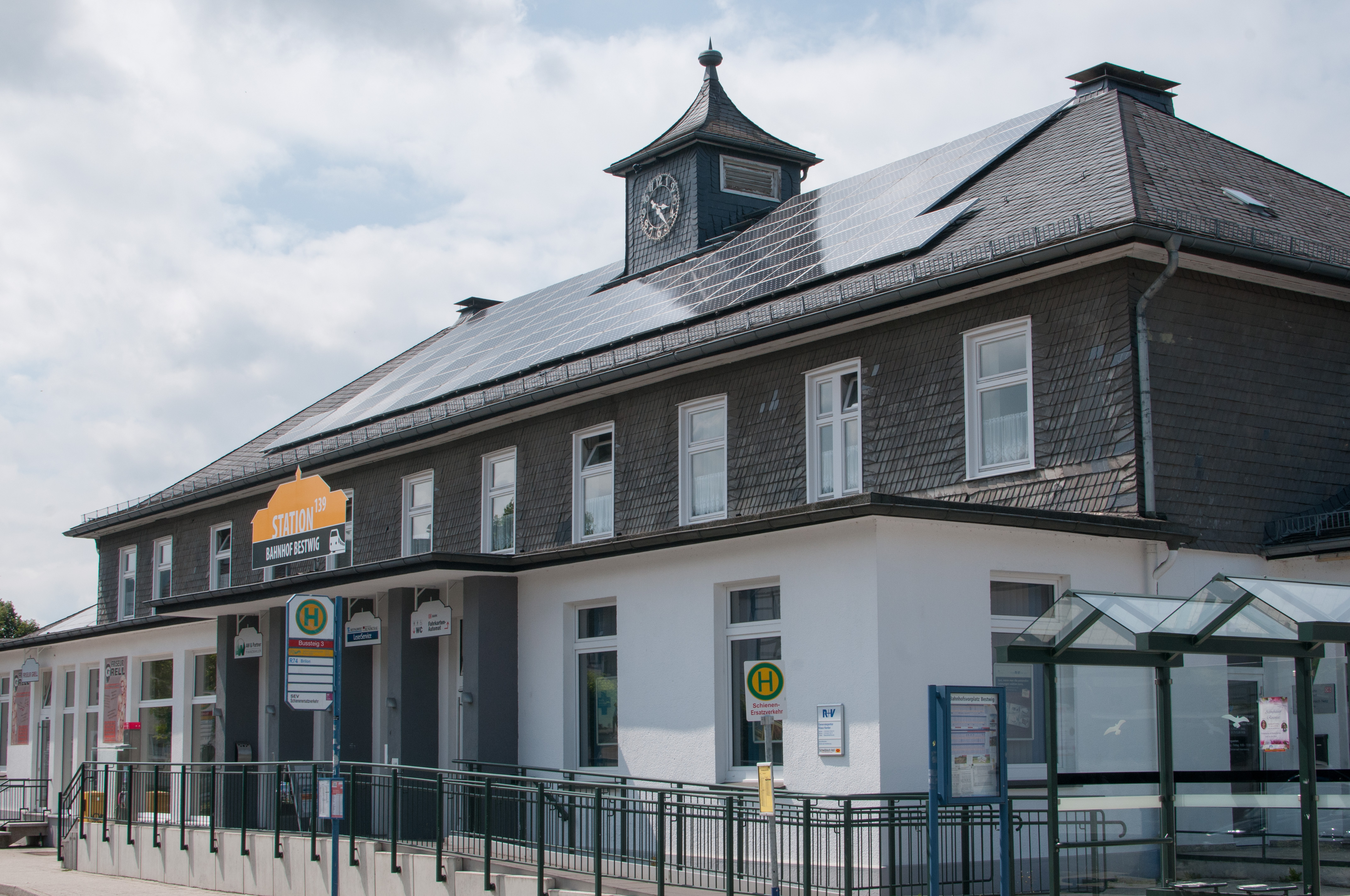 Bahnhof in Bestwig